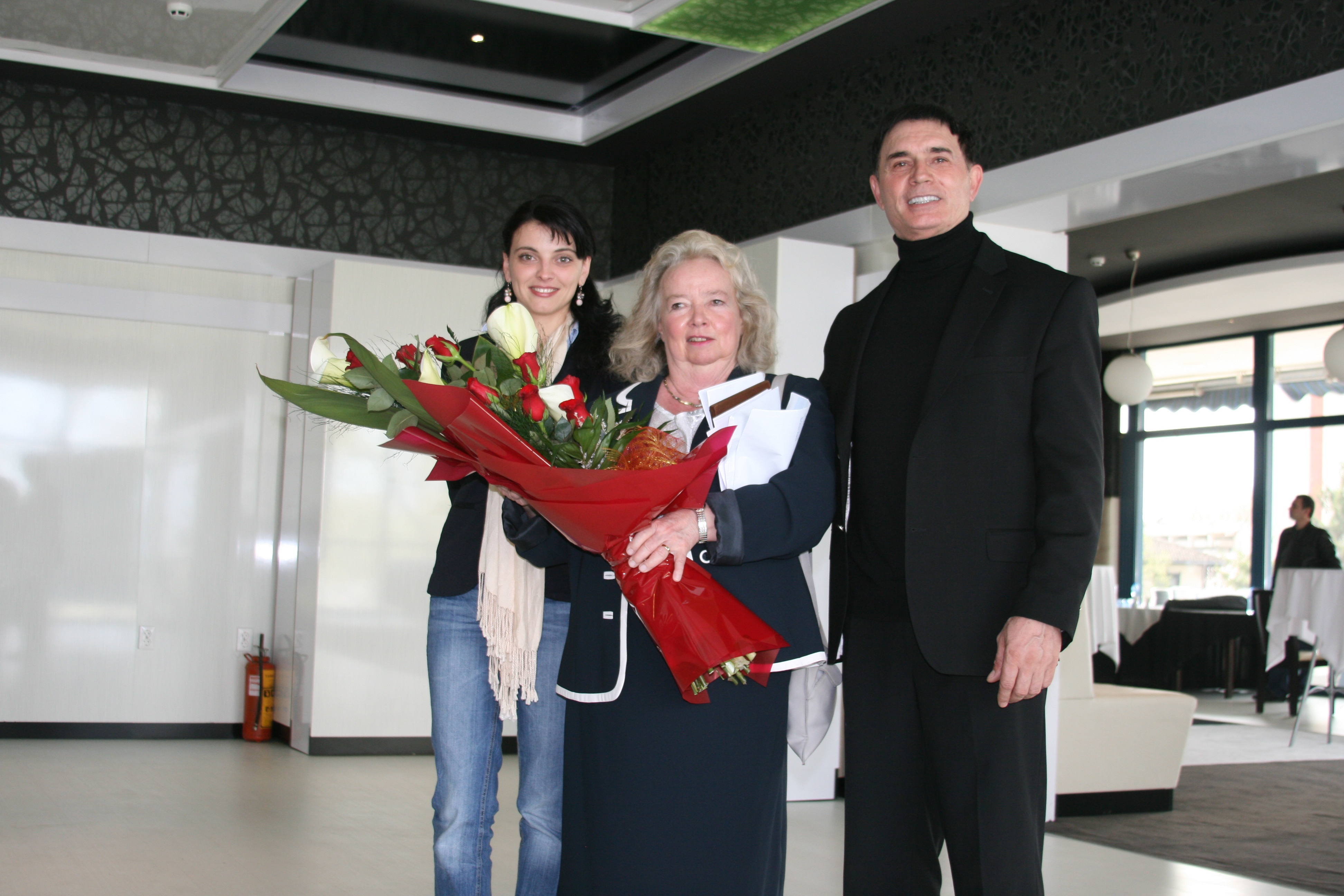 Димитър Куцаров с Бриджит Чернота